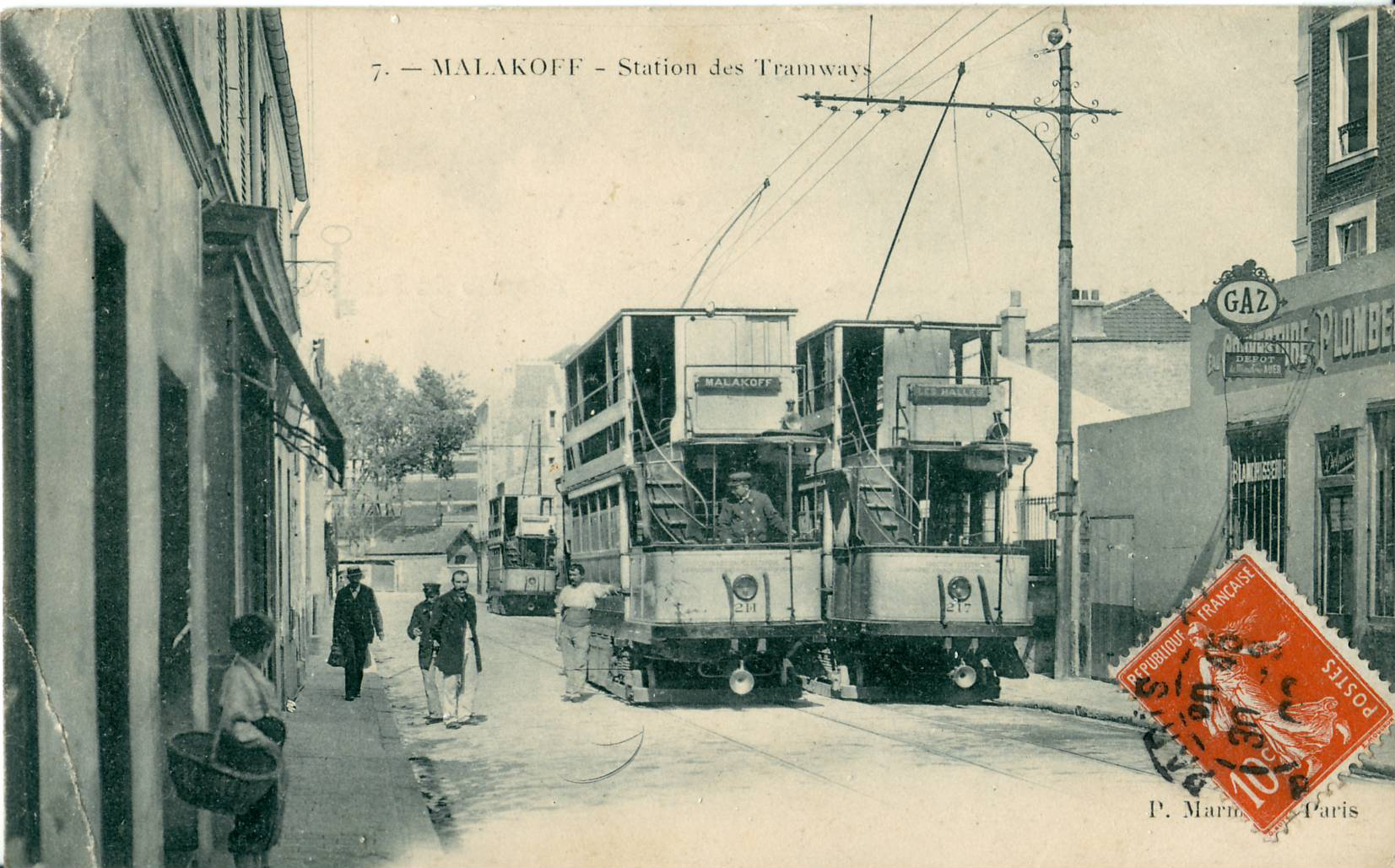 Carte postale ancienne éditée par Marmuse, N°7MALAKOFF - Station des TramwaysLigne N° 13 (Les Halles - Malakoff) de la Compagnie générale parisienne de tramways (CGPT)